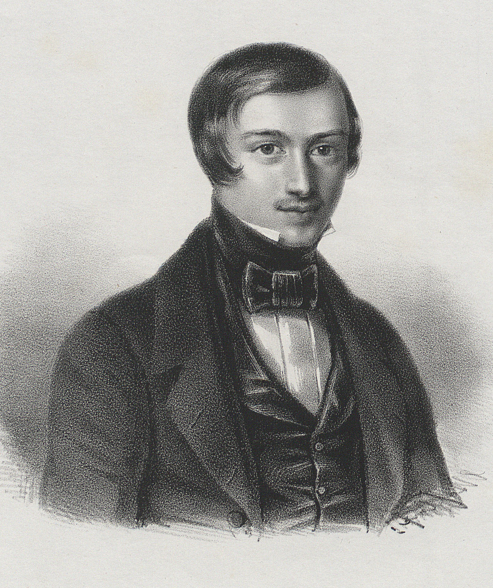 Józef Władysław Krogulski